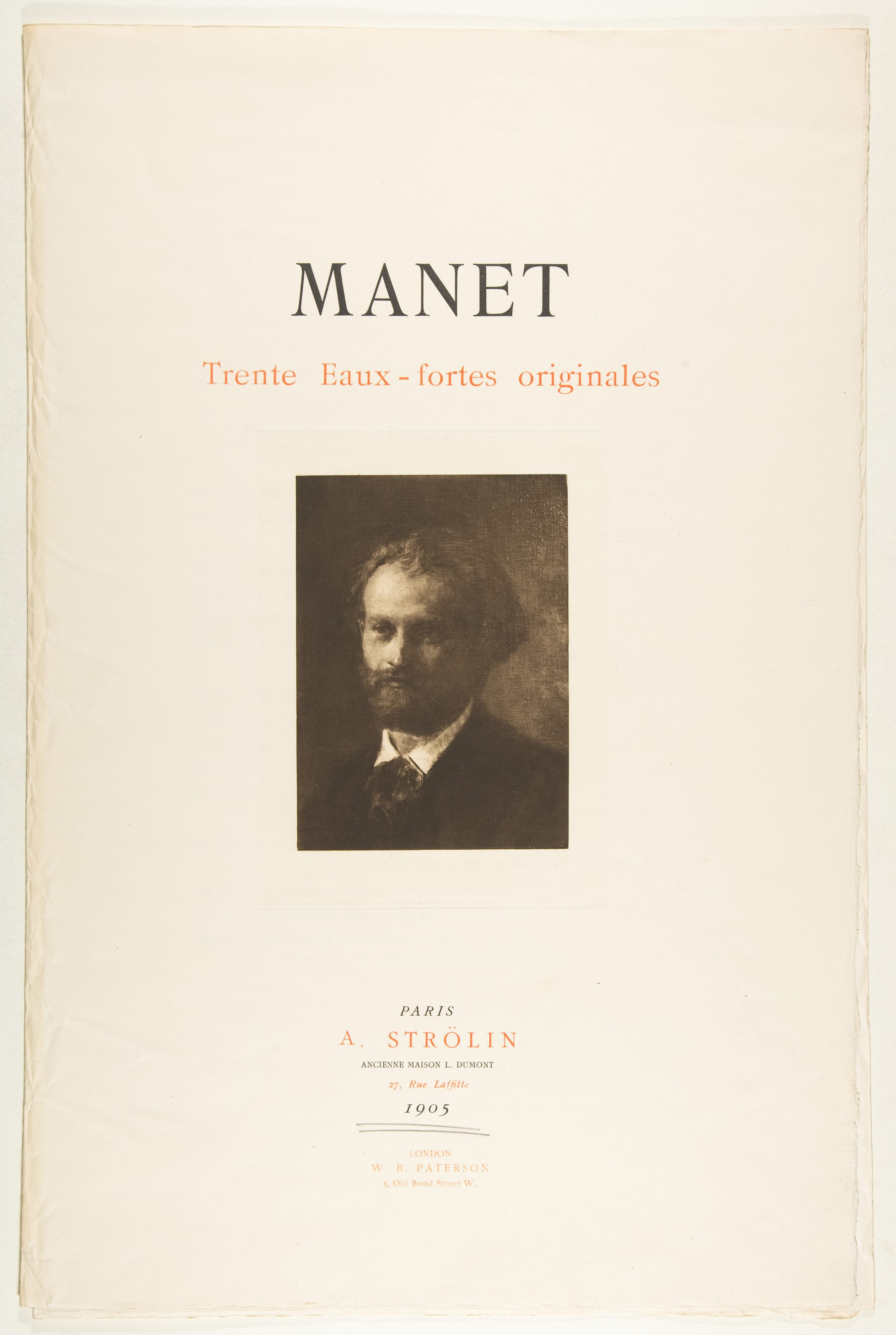 Portfolio; Portfolios